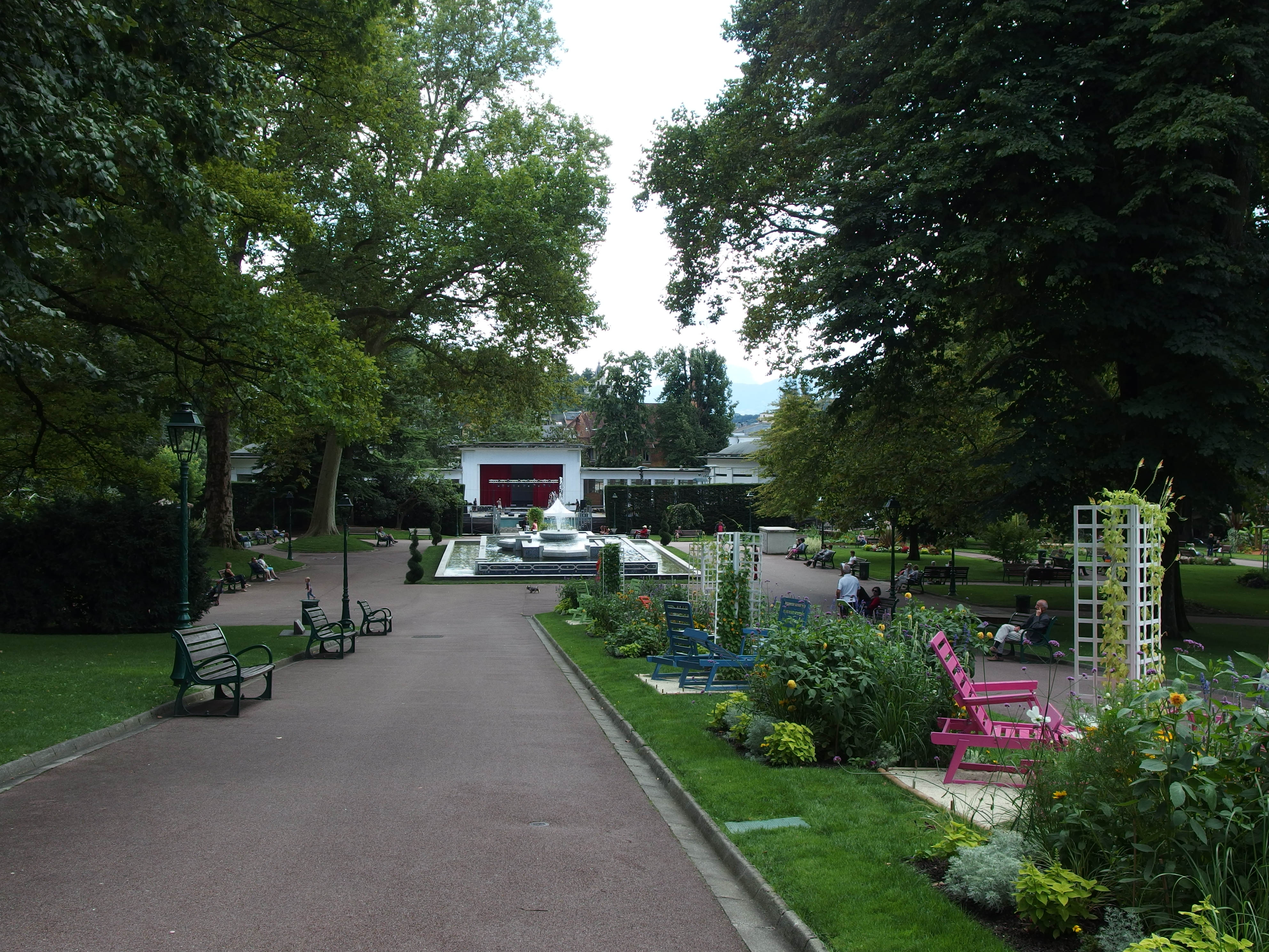 Parc floral des Thermes (2015).